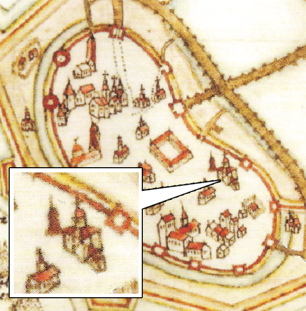 Борисоглебский собор XII-XV в.в. на шведском плане 1611г.